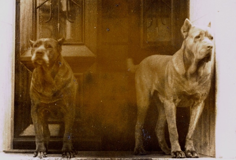 Vecchia foto tratta dal libro Obiettivo zootecnico sul Mastino Napoletano, di Antonio Crepaldi 2004 (Edizioni Crepaldi). Sulla destra il Cane e' presa (l’odierno Mastino Napoletano) Sulla sinistra il Can Corz (l’odierno Cane Corso)